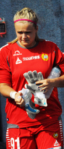 a_55_1418